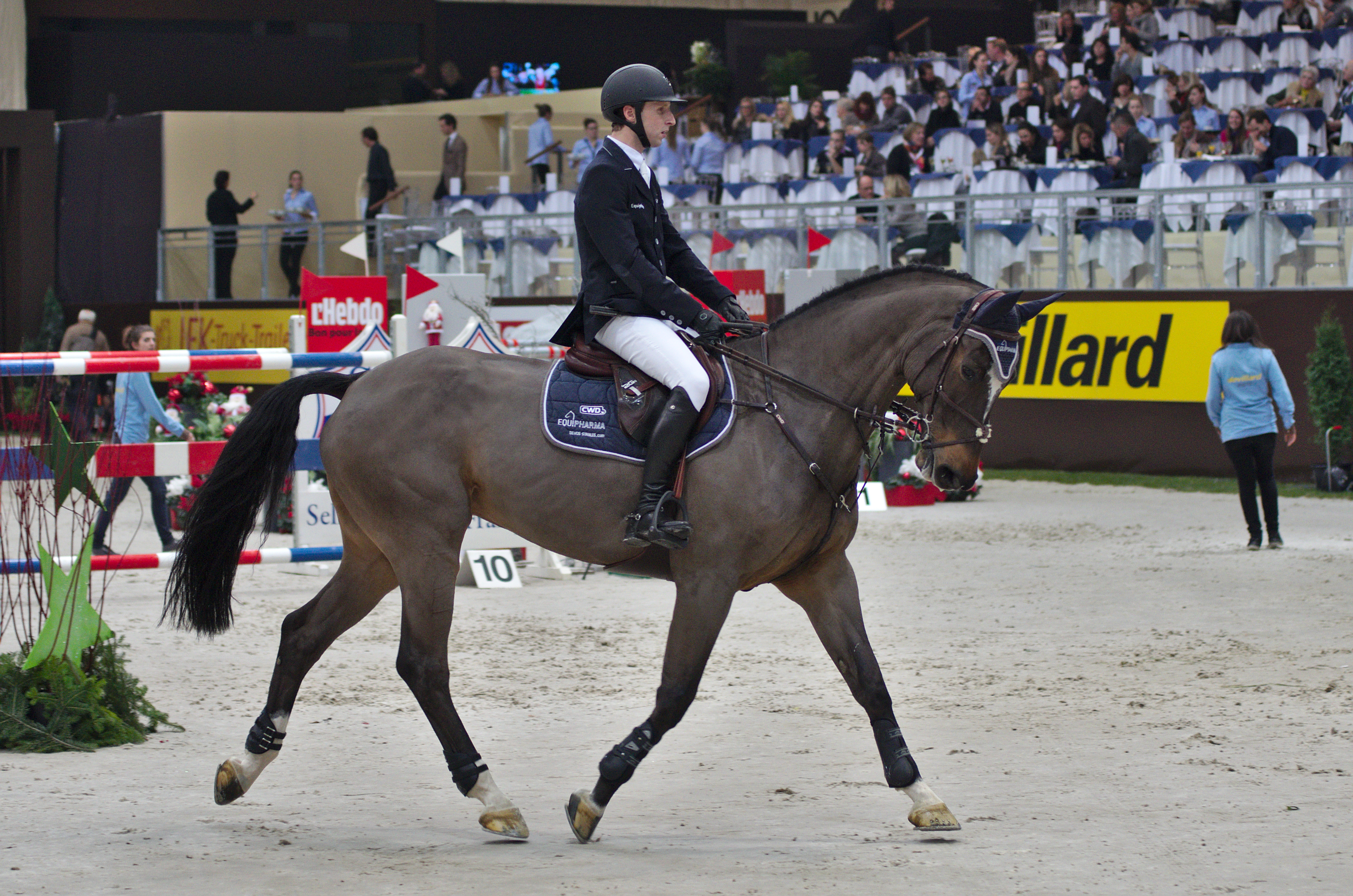 CHI Genève 2013 - 20131212 - Pieter Devos et Dream of India Greenfield